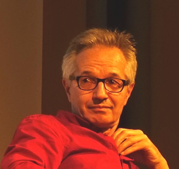 Frédéric Pagès à la Bibliothèque Mériadeck de Bordeaux de 17 octobre 2018